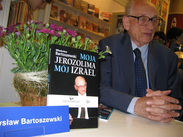 Władysław Bartoszewski (1922-2015), Polish historician, writer and politician